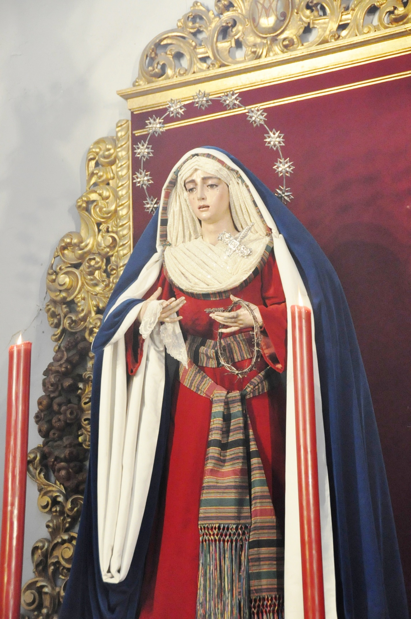 Imagen de la Virgen de la Salud en la cuaresma del 2010.